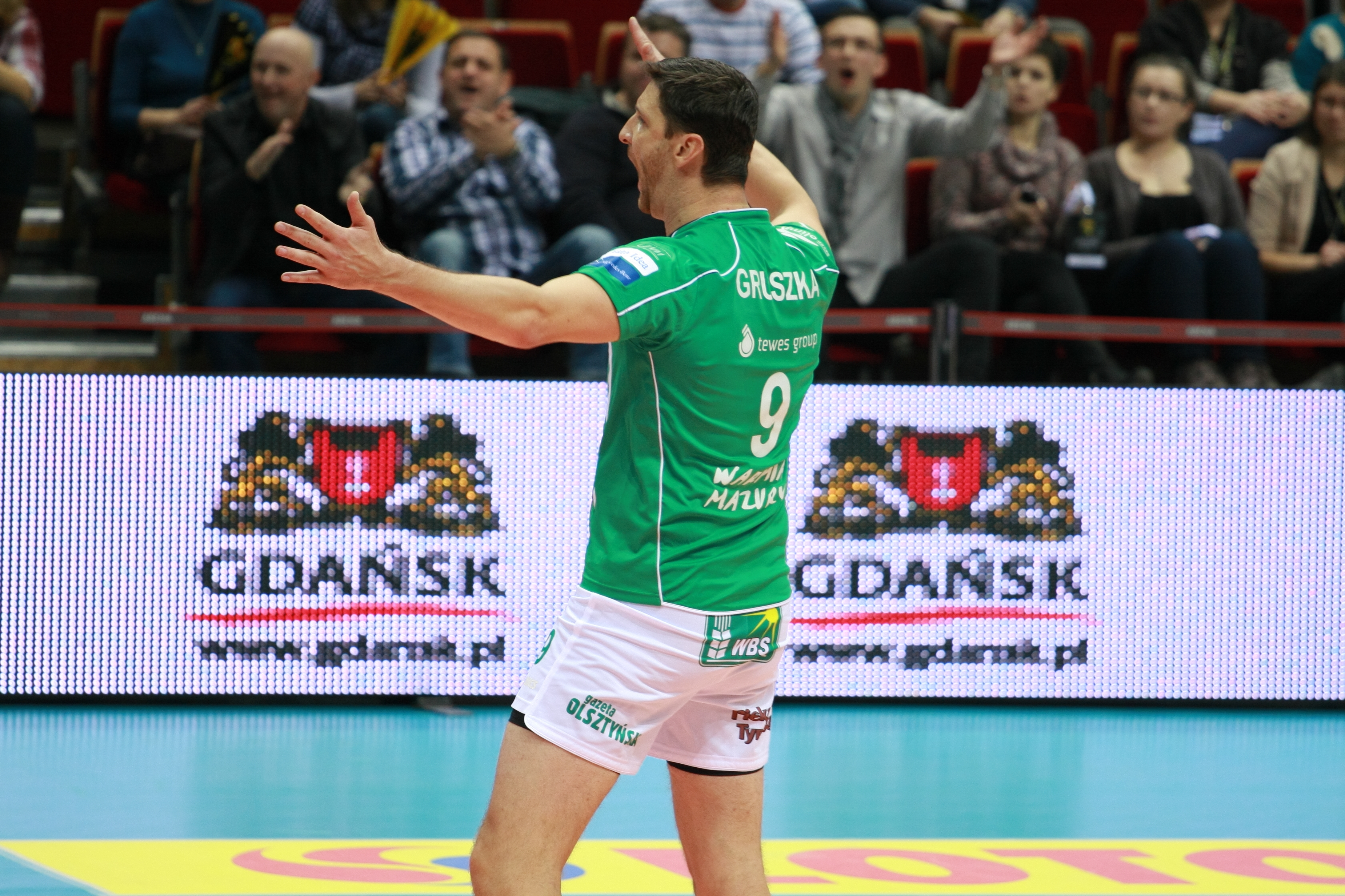 Piotr Gruszka